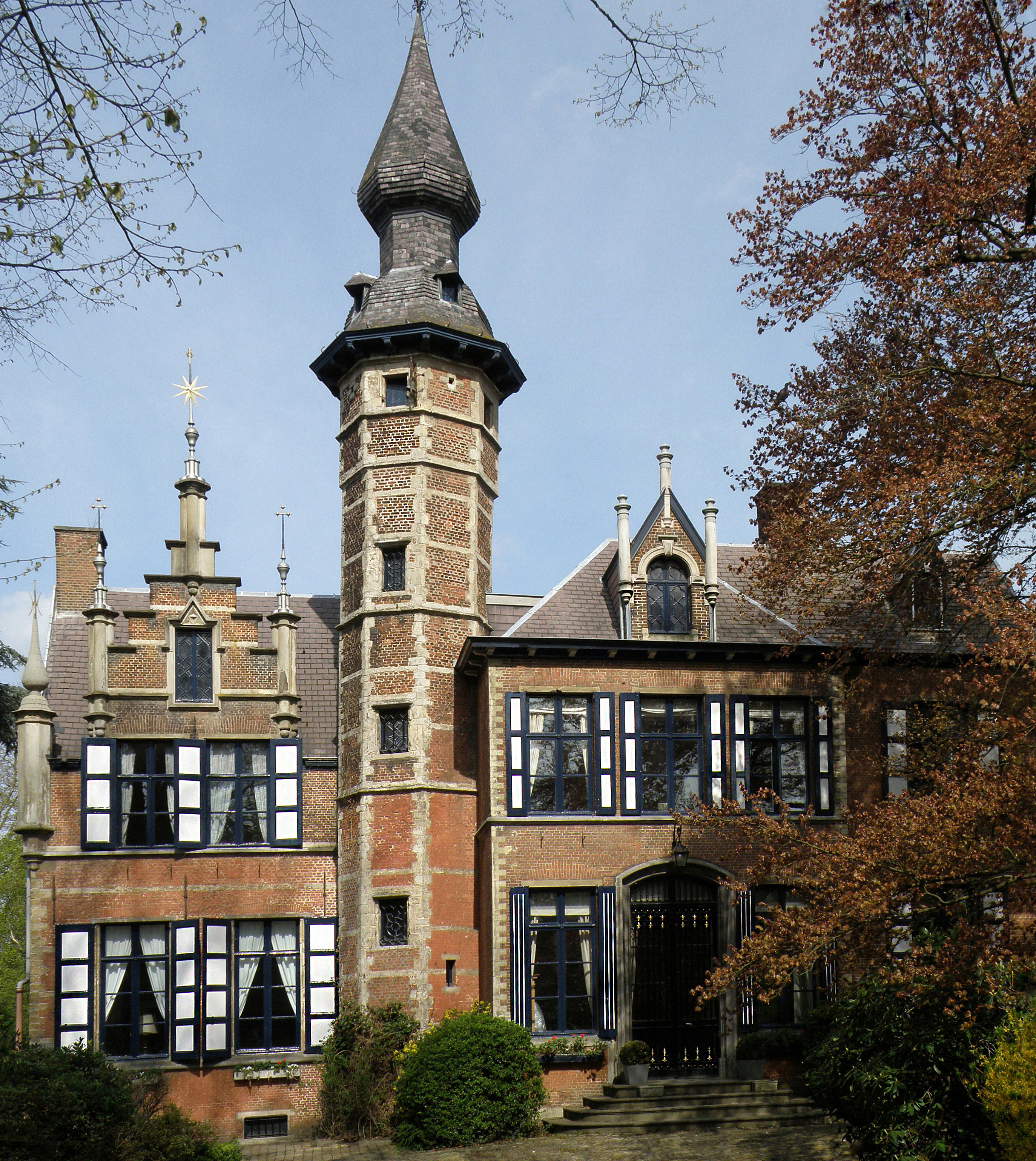 Mortsel (prov. d’Anvers, Belgique). Château Ten Dorpe, sis au n° 3 de la Theofiel Reynlaan, dans la lointaine banlieue sud-est d’Anvers. Daté du XVIIe ; importants remaniements au XIXe dans le sens néo-Renaissance flamande.